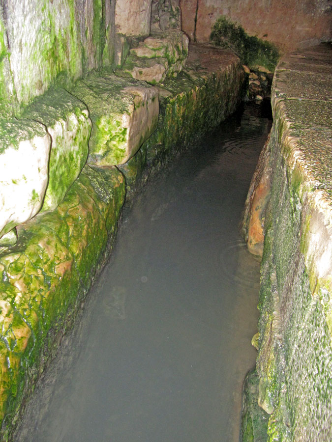 Hezekiah's Tunnel נקבת השילוח